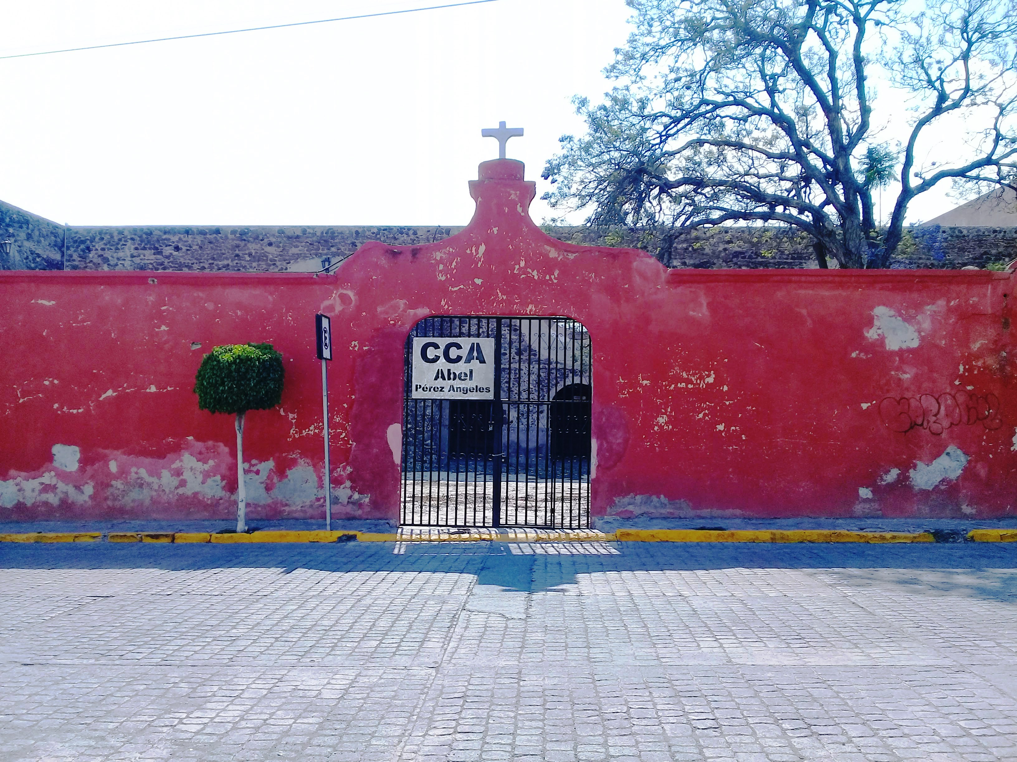 Templo y exconvento de San Nicolás de Tolentino en Actopan, Hidalgo, México.